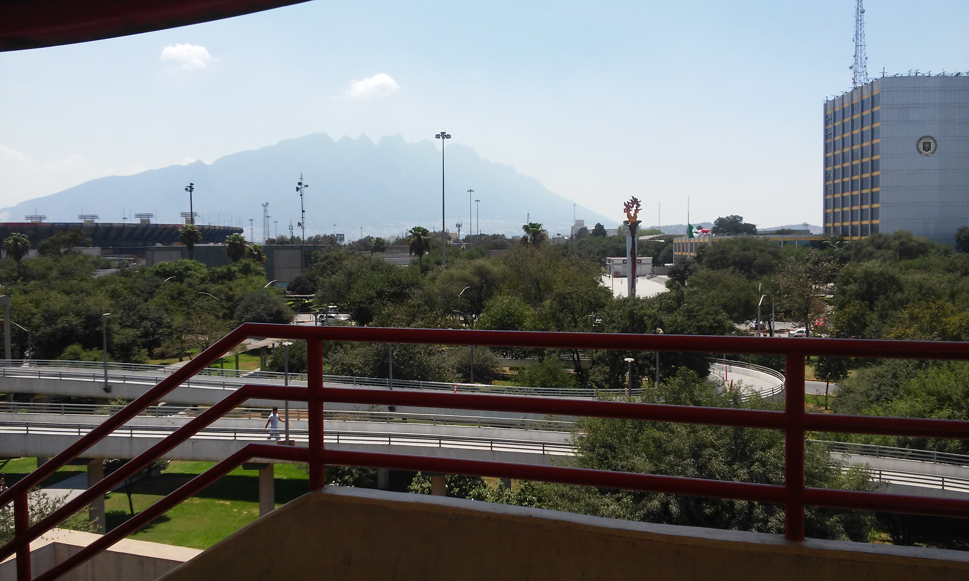 Vista